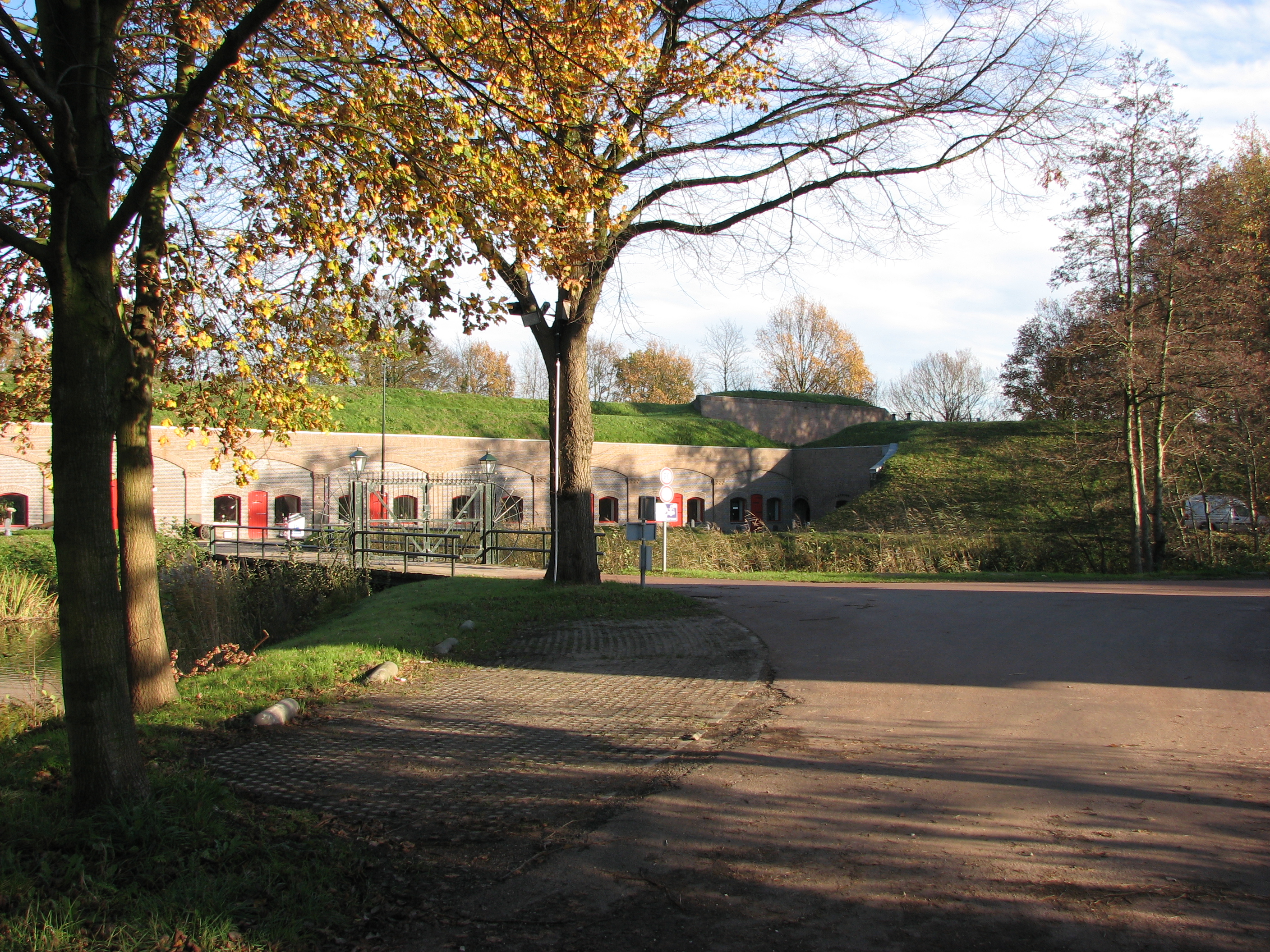 Fort Voordorp